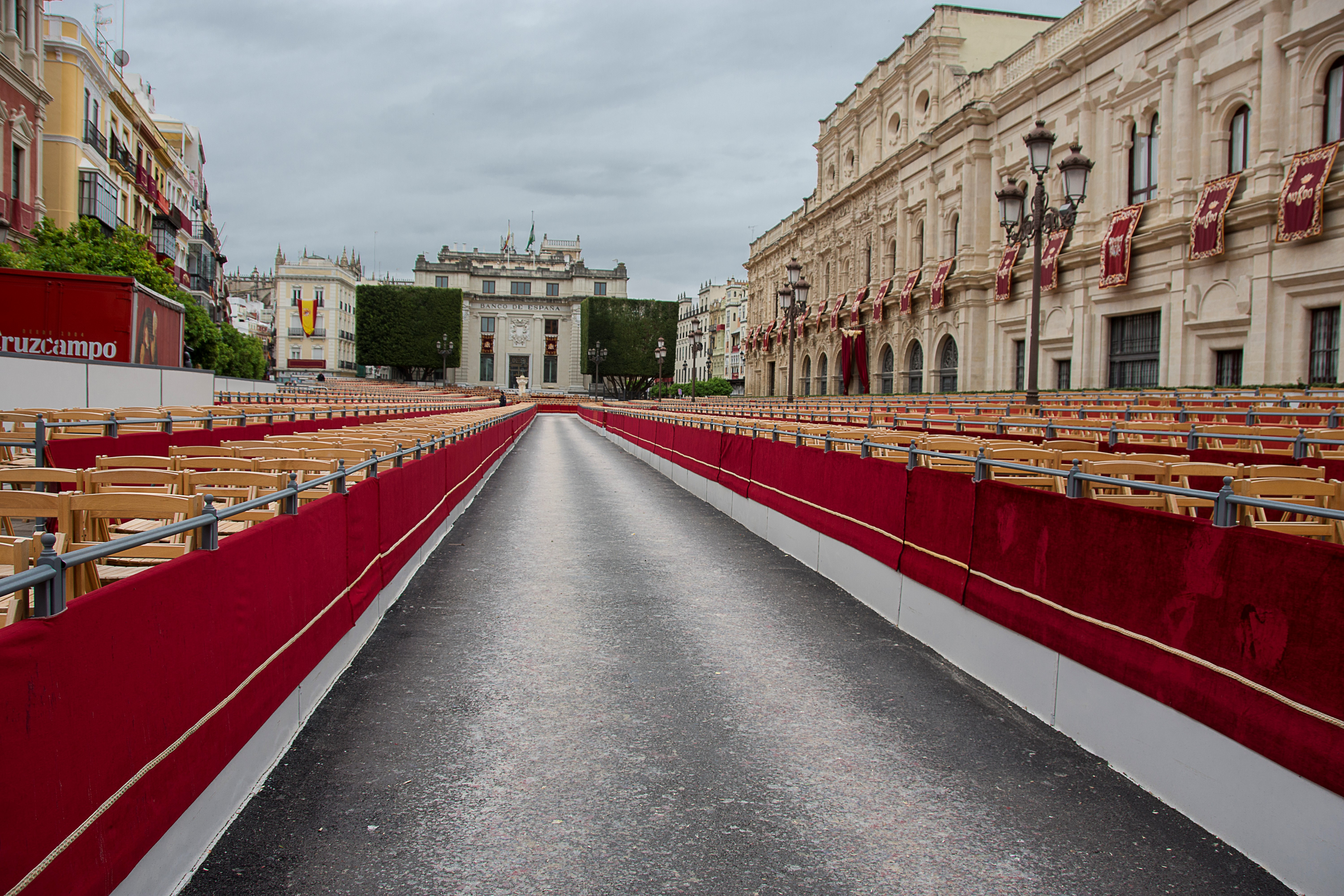 Palcos de la carrera oficial de la Semana Santa de Sevilla